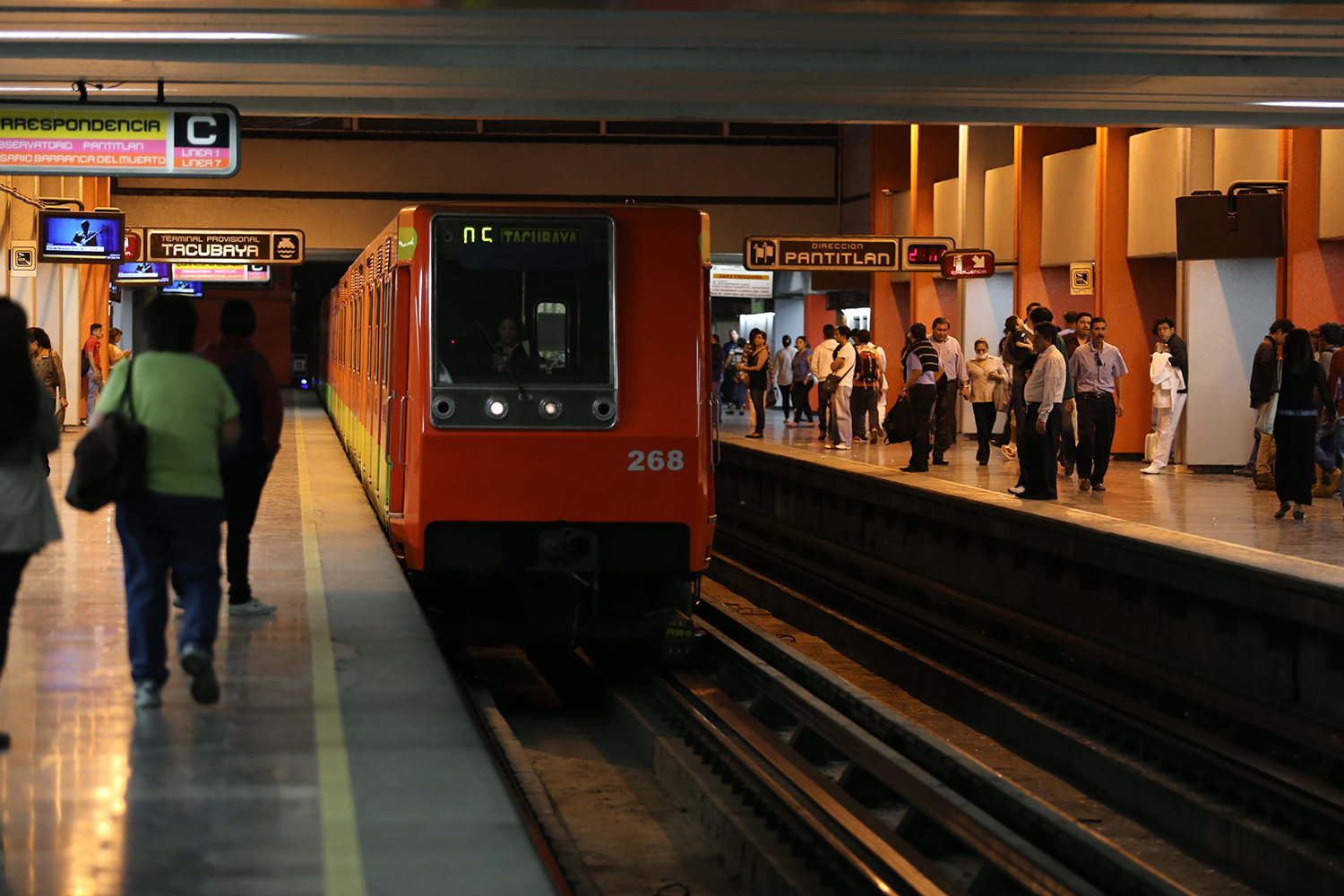 Metro CDMX